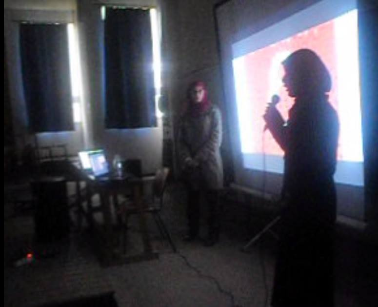 girls power yeah